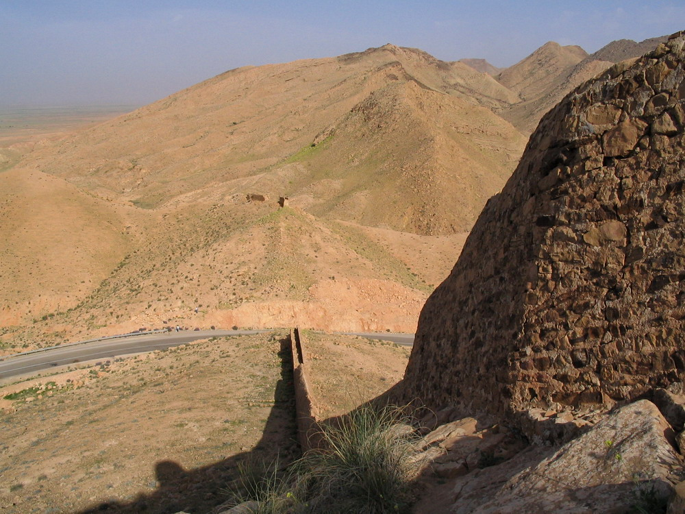 mur romain (clausura)